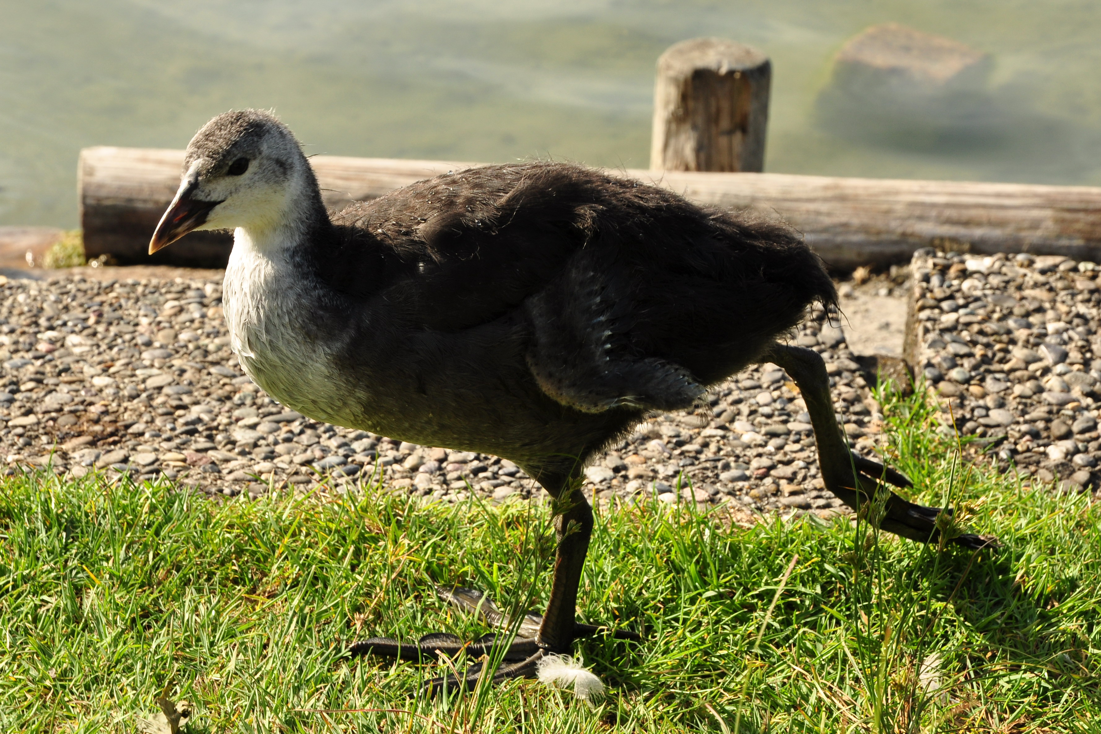 Fulica atra, unterer Katzensee in Zürich-Affoltern (Switzerland)